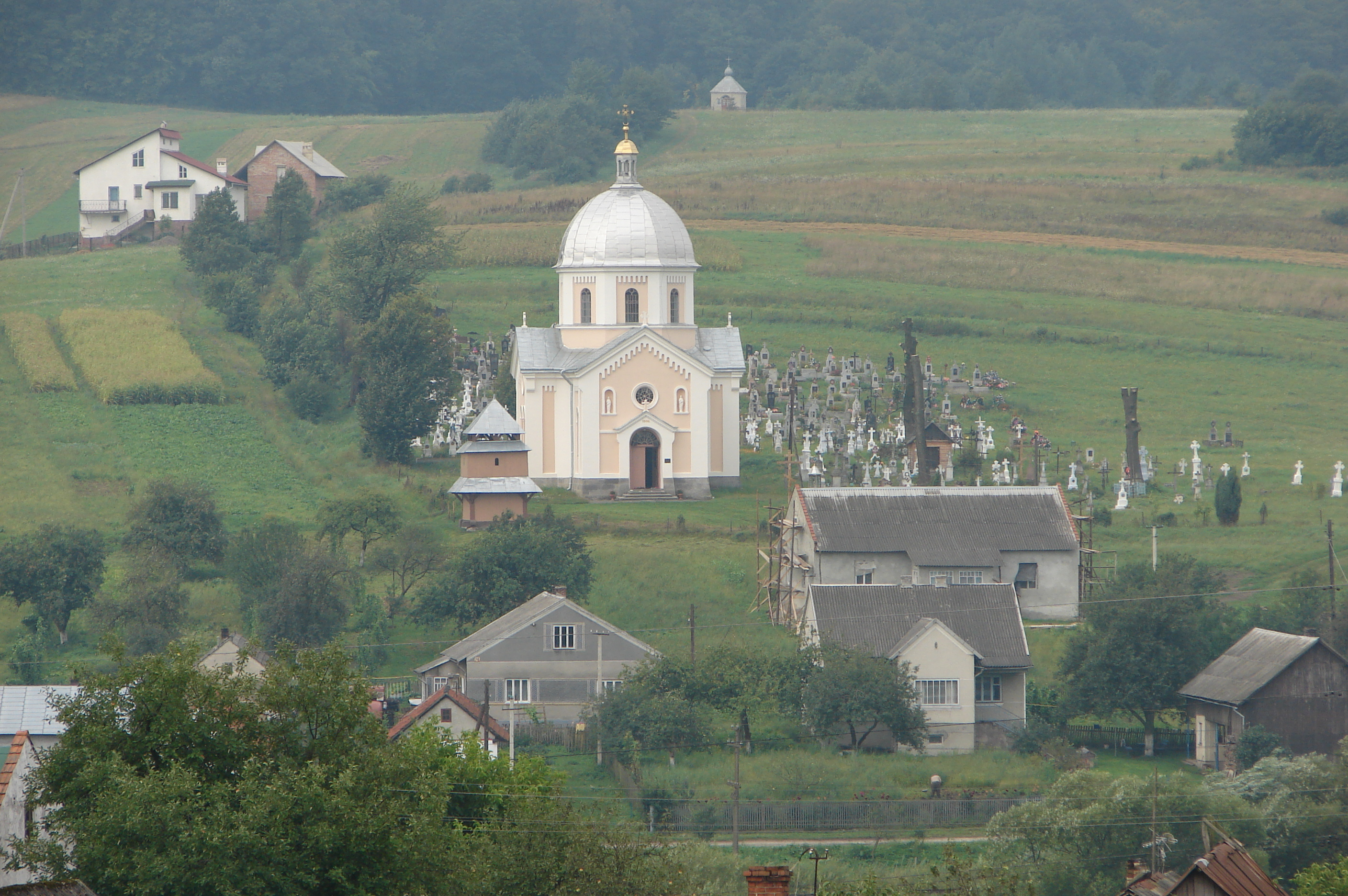 Підмонастир:Краєвид